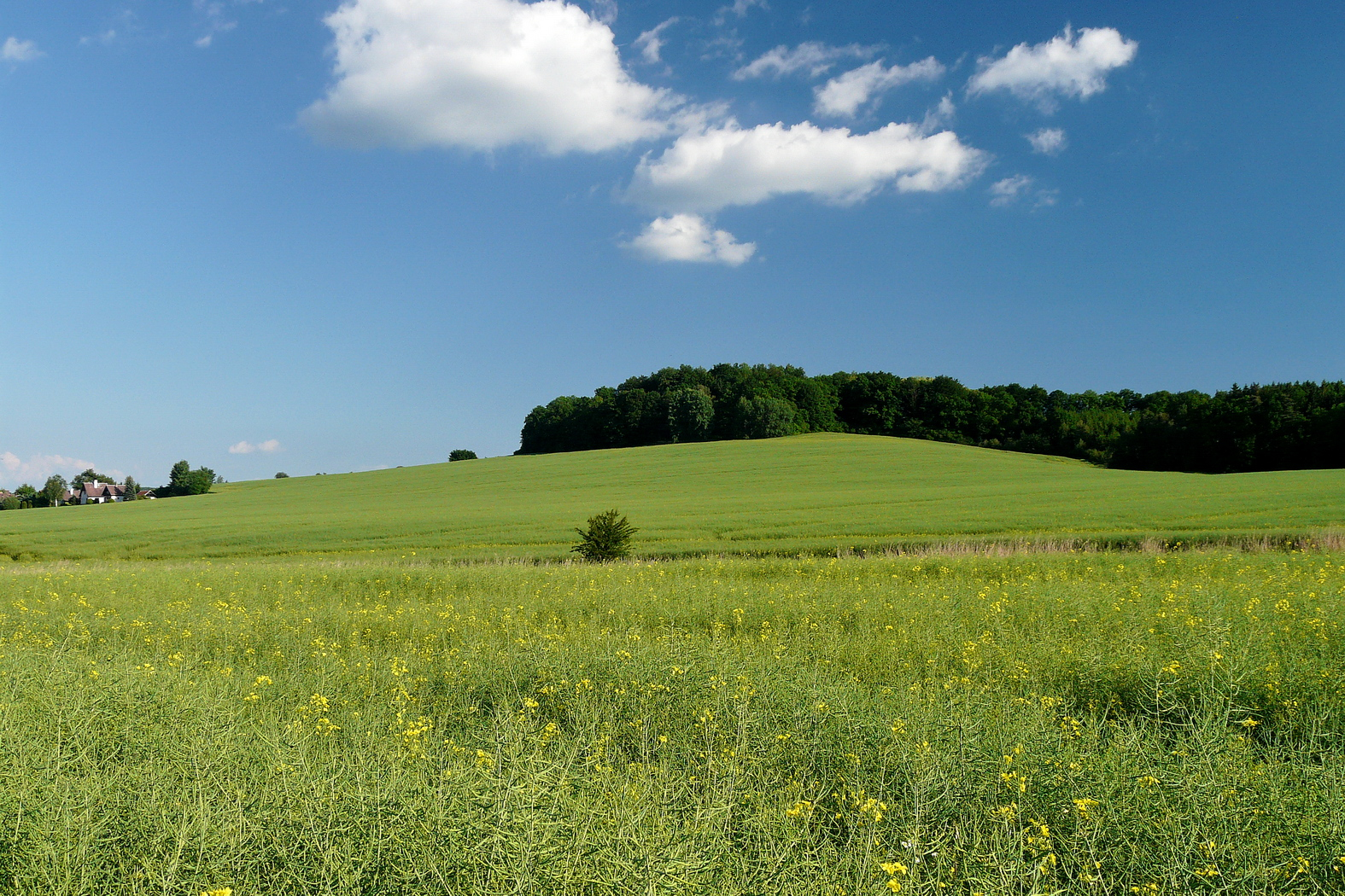 Mladějovská horka